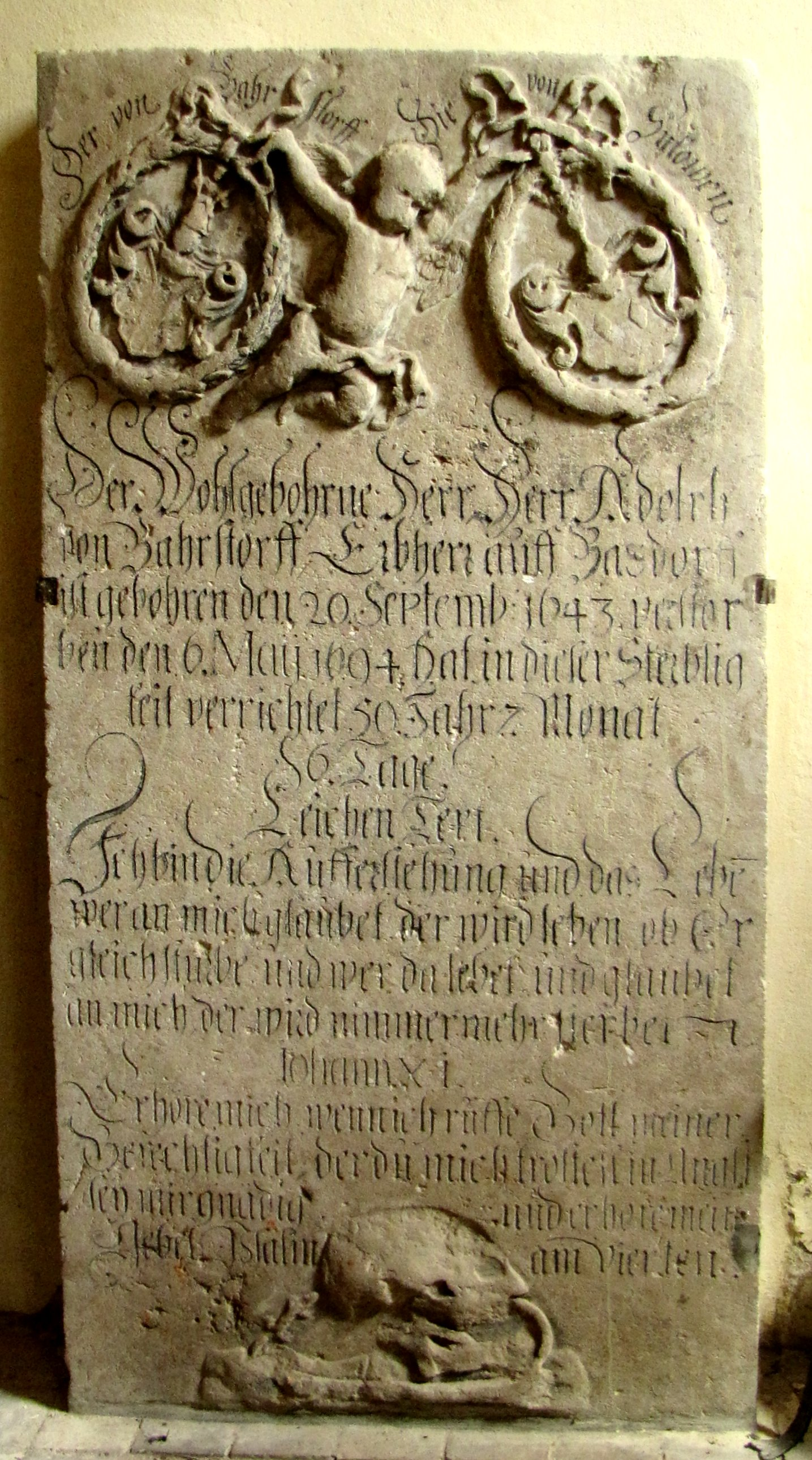 Dorfkirche in Barsdorf, Fürstenberg/Havel, Brandenburg, Deutschland